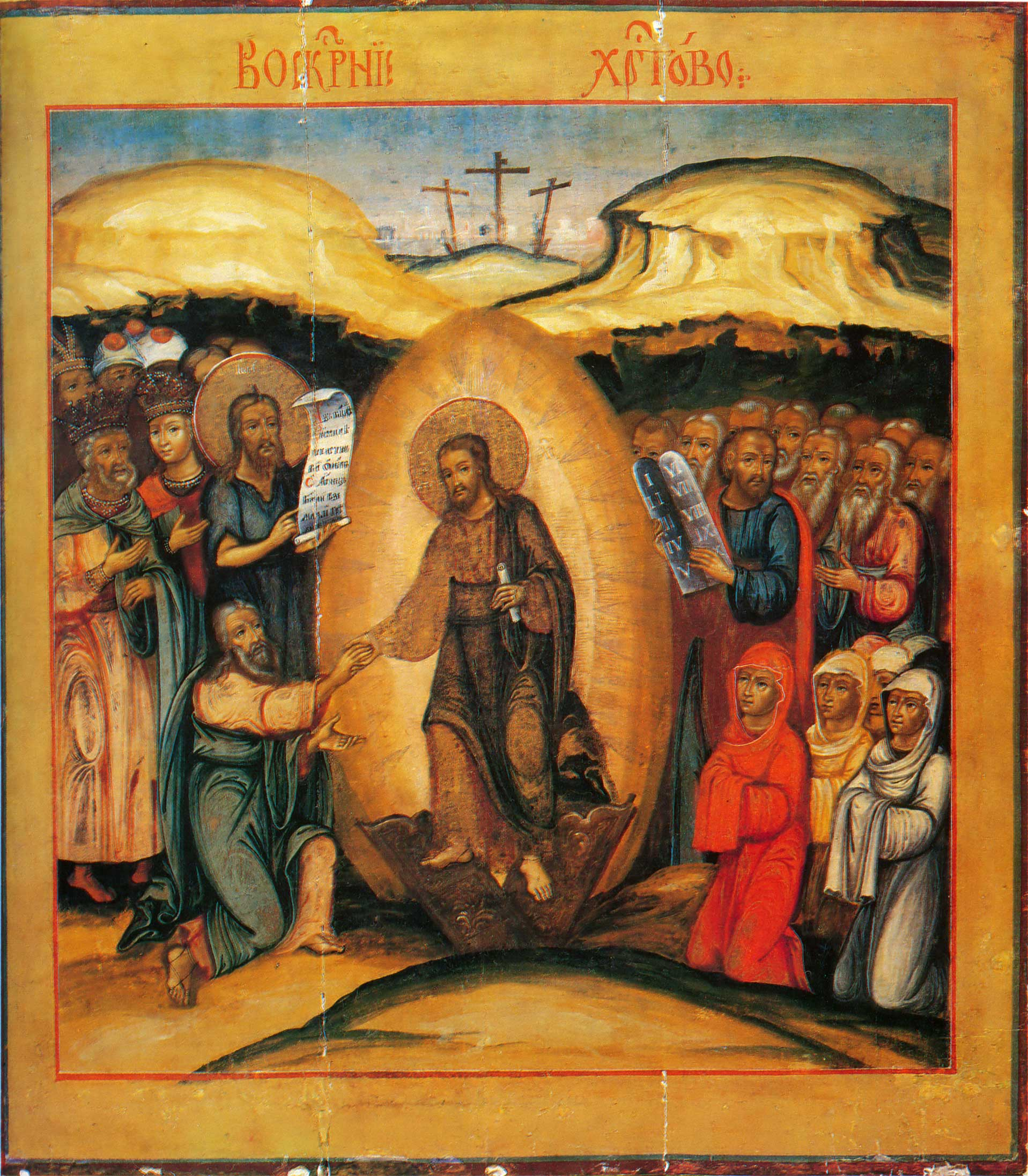 Воскресение Христово Конец XVIII в. Из церкви села Селезениха Тверской губернии. Изображение воспроизводится по изданию: Красилин М. М. Иконопись и декоративно прикладное искусство // Духовная среда России. Певческие книги и иконы XVII — начала XX веков. М., 1996.